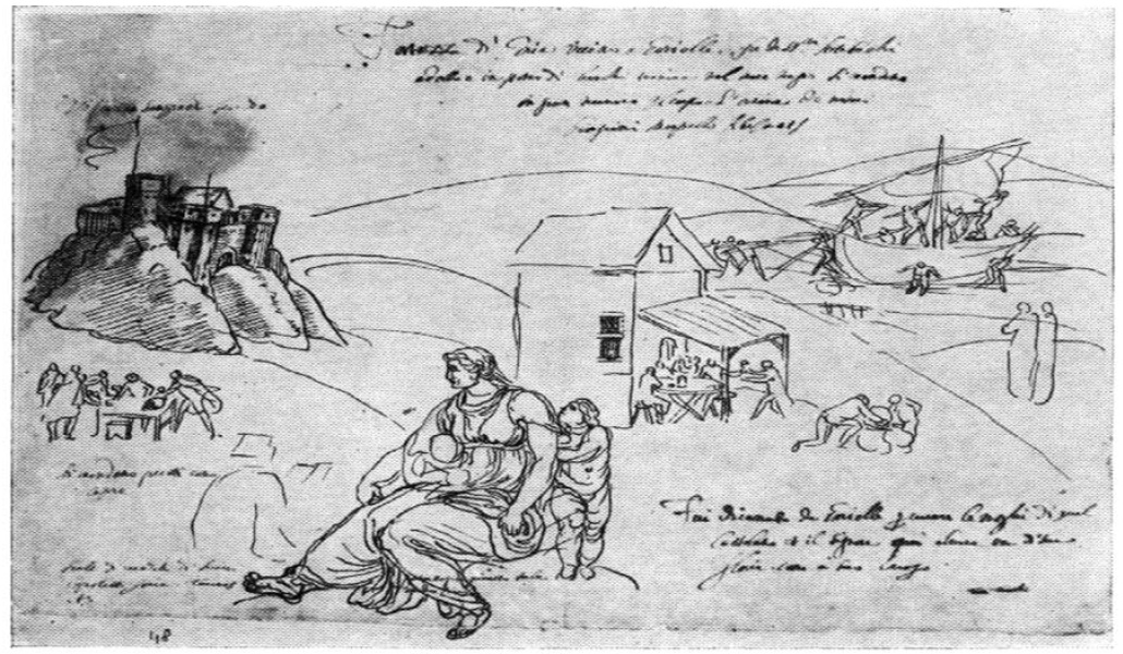 გონიოს ციხე-სიმაგრე, კასტელის ნახატი